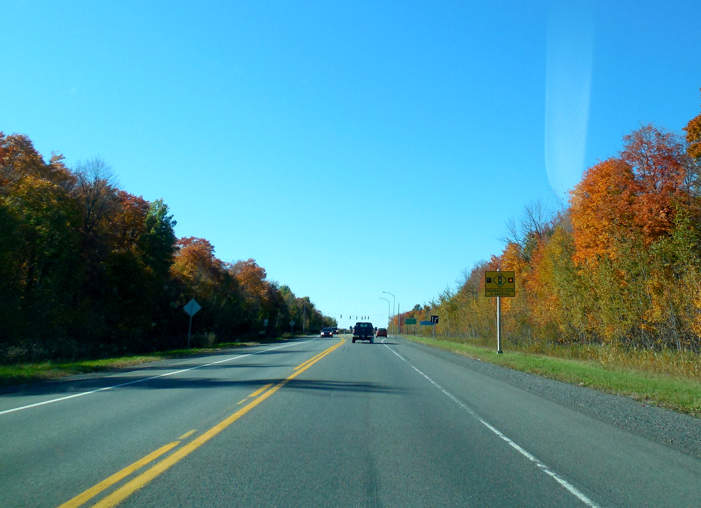 Quebec Route 158